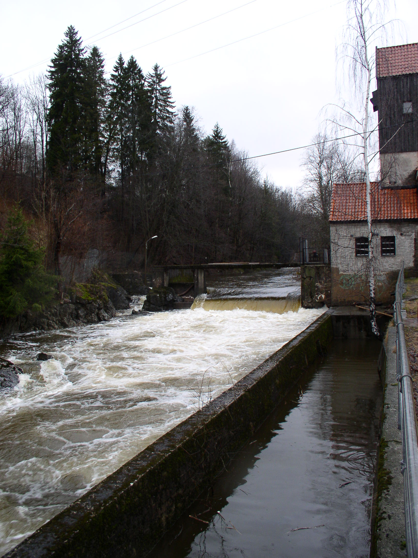 Franzefoss i april 2007